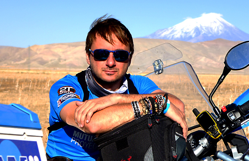 El escritor y viajero Fabián C. Barrio en el monte Ararat, Turquía.